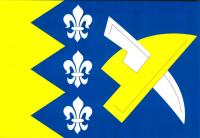 vlajka Heřmaneč